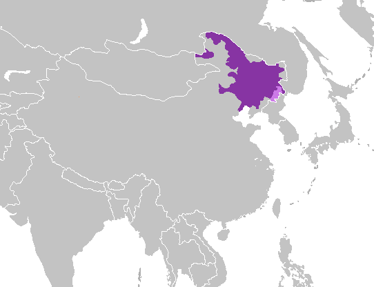 Dialecto Mandarín noreste